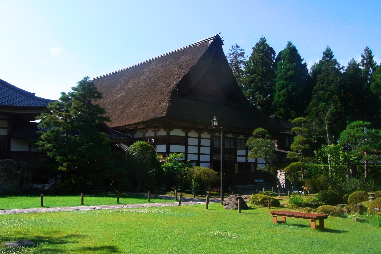 妙宣寺はケータイ国盗り合戦のイベント、天地人紀行・義の章の目的地の一つでした。